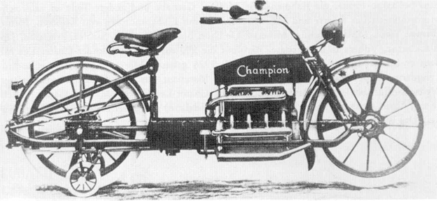 Champion 1260 cc motorcycle. Made by Champion (Peerless) Motorcycle Mfg. Co., St. Louis.